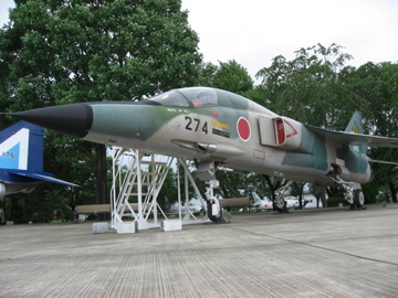 茨城県の航空自衛隊百里基地にて撮影したF-1戦闘機。